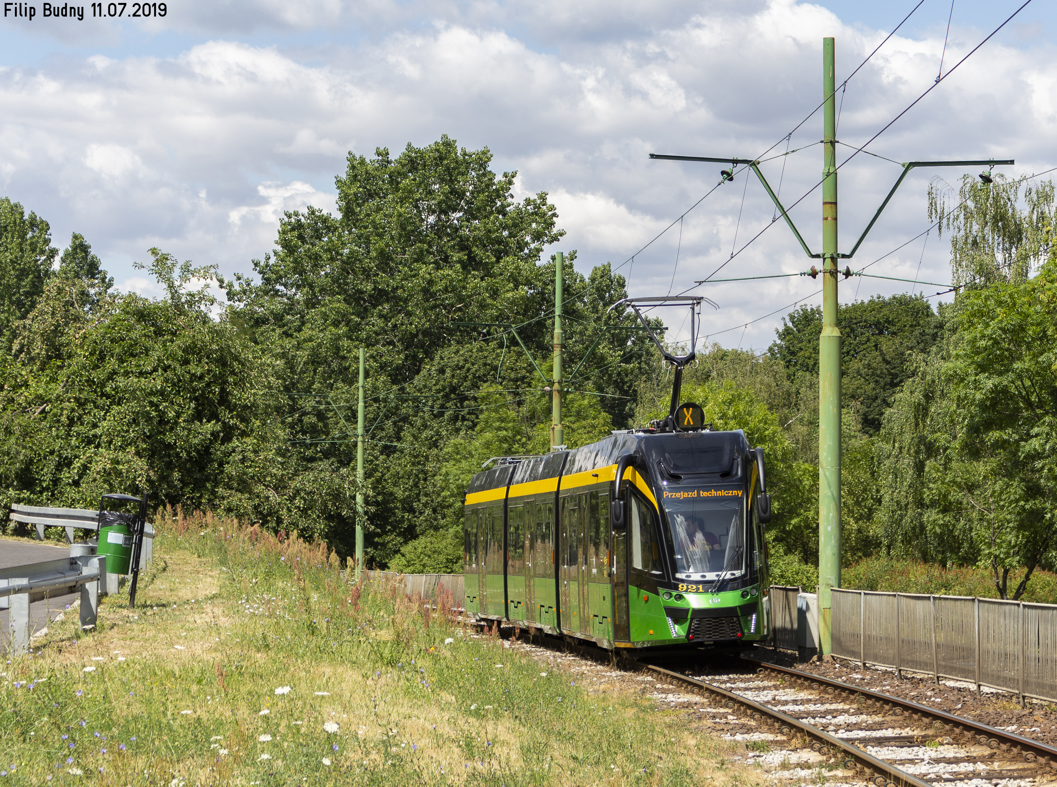 Dwukierunkowy Moderus Gamma LF03 AC BD nieopodal przystanku Os. Lecha.